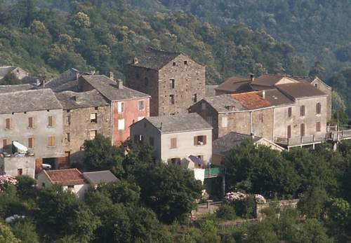 village d'A Casabianca en Castagniccia, Corse, Corsica